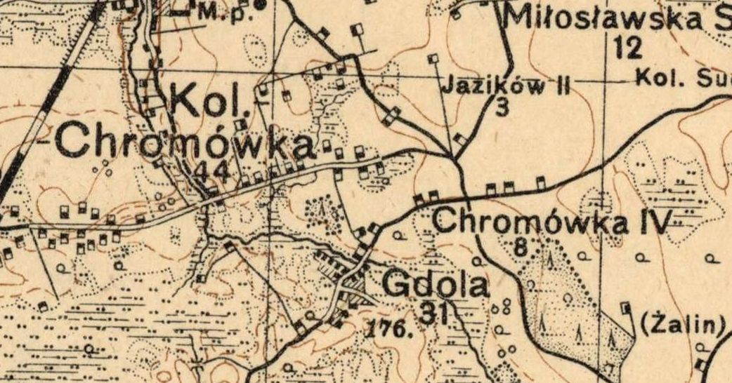 Chromówka (powiat chełmski) na mapie Wojskowego Instytutu Geograficznego z 1931 r.